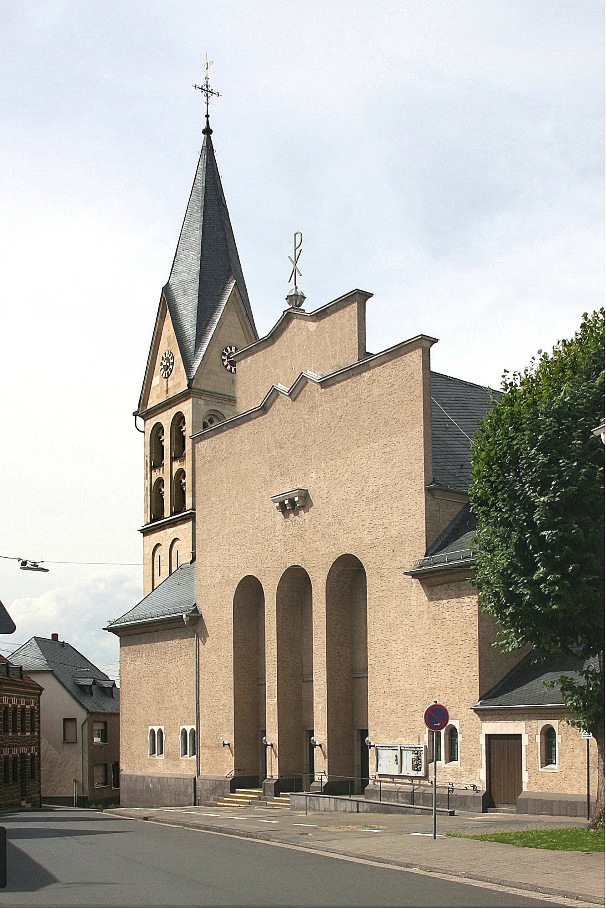 Südfassade der Pfarrkirche St. Mauritius Kärlich